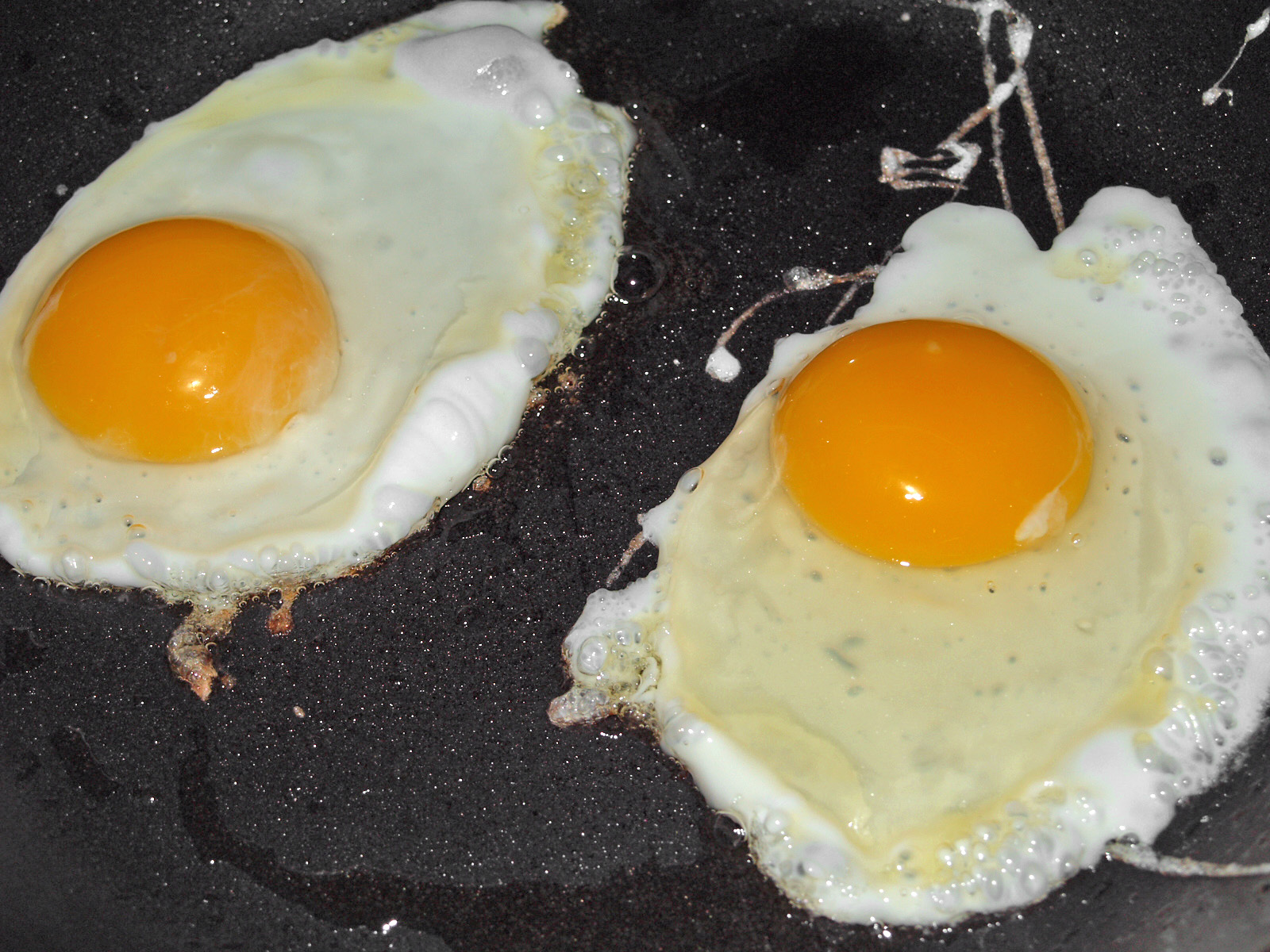 fried eggs